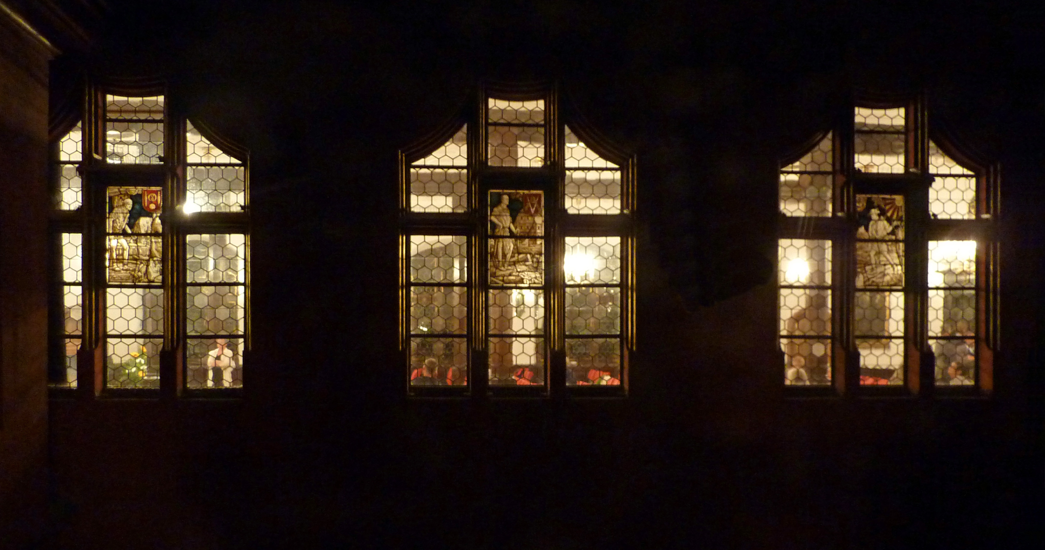 Die Fenster des Historischen Kaufhauses in Freiburg am Abend fotografiert. Die Glasmalereien sind von Fritz Geiges.